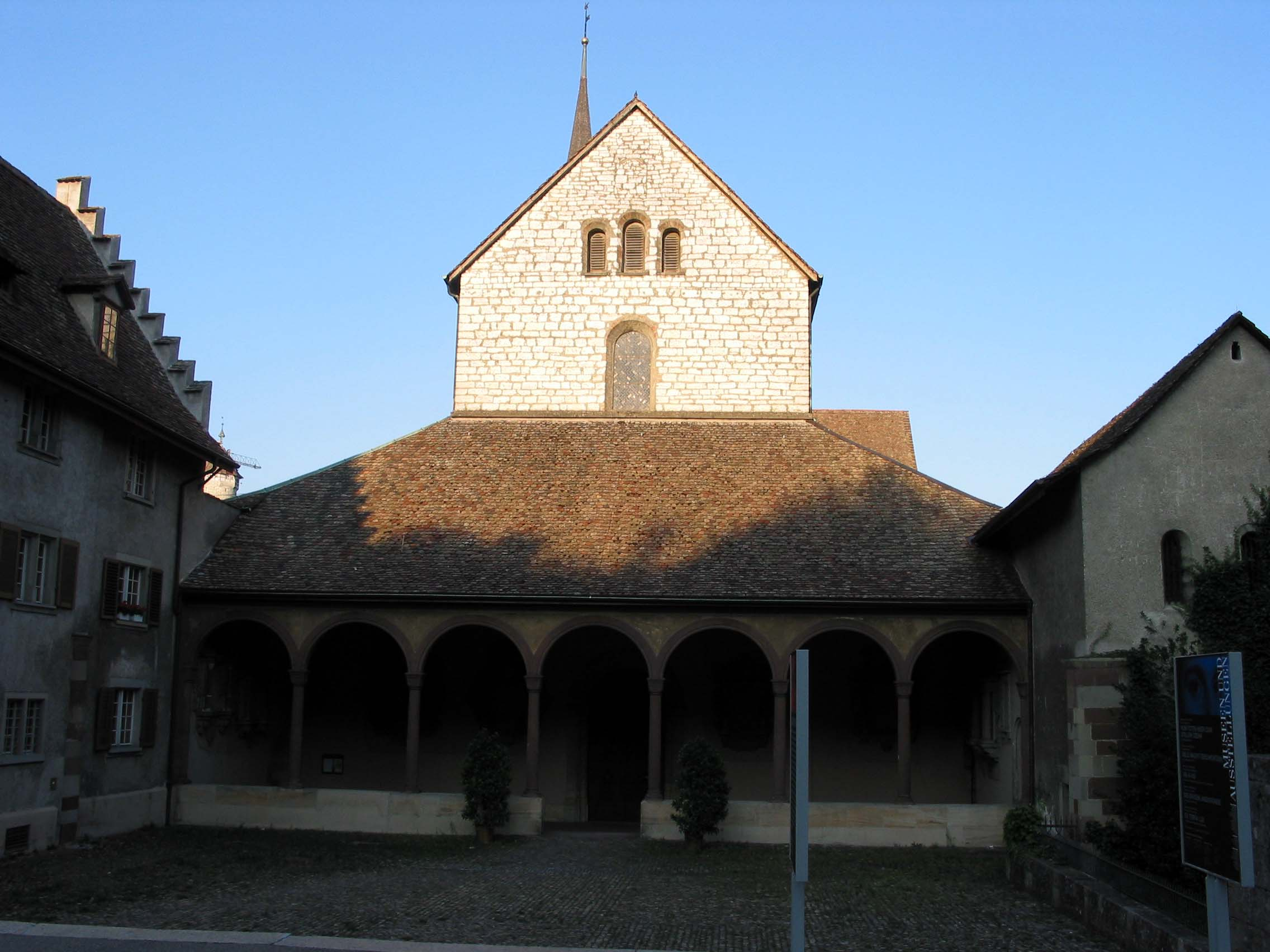 Hof des Münsters des Klosters Allerheiligen in Schaffhausen